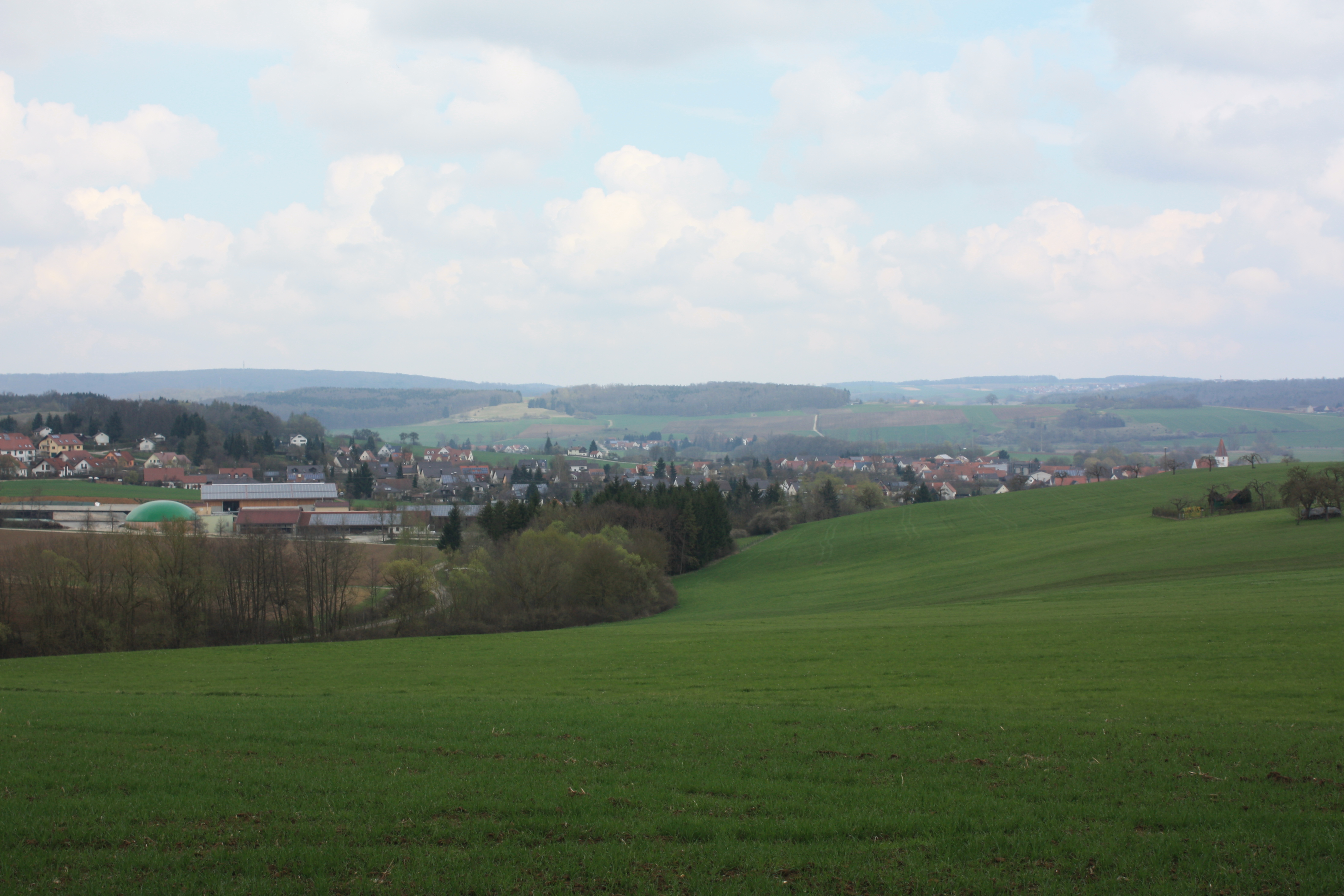 Ebermergen, Stadtteil von Harburg (Schwaben)